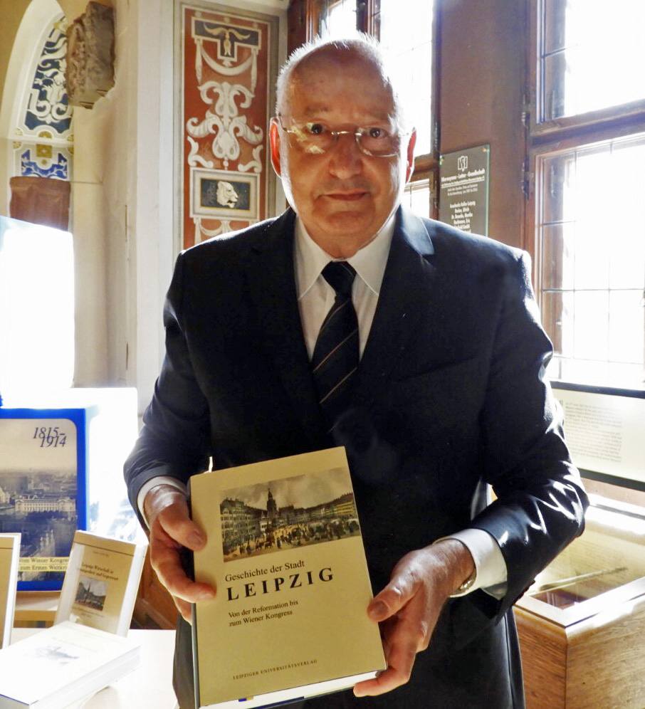 Prof. von Hehl in Leipzig 2019